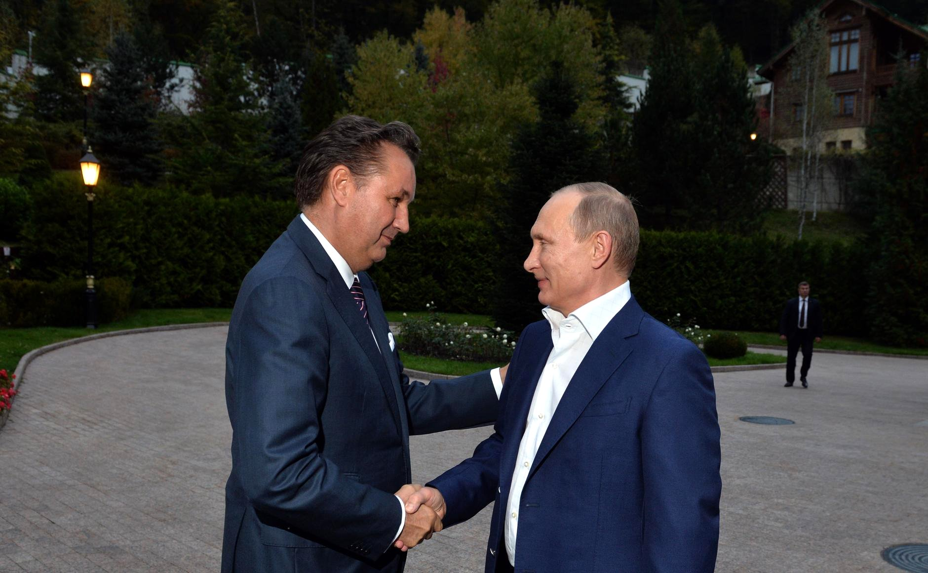 Президент России Владимир Путин с генеральным директором "АвтоВАЗа" Бу Андерсоном